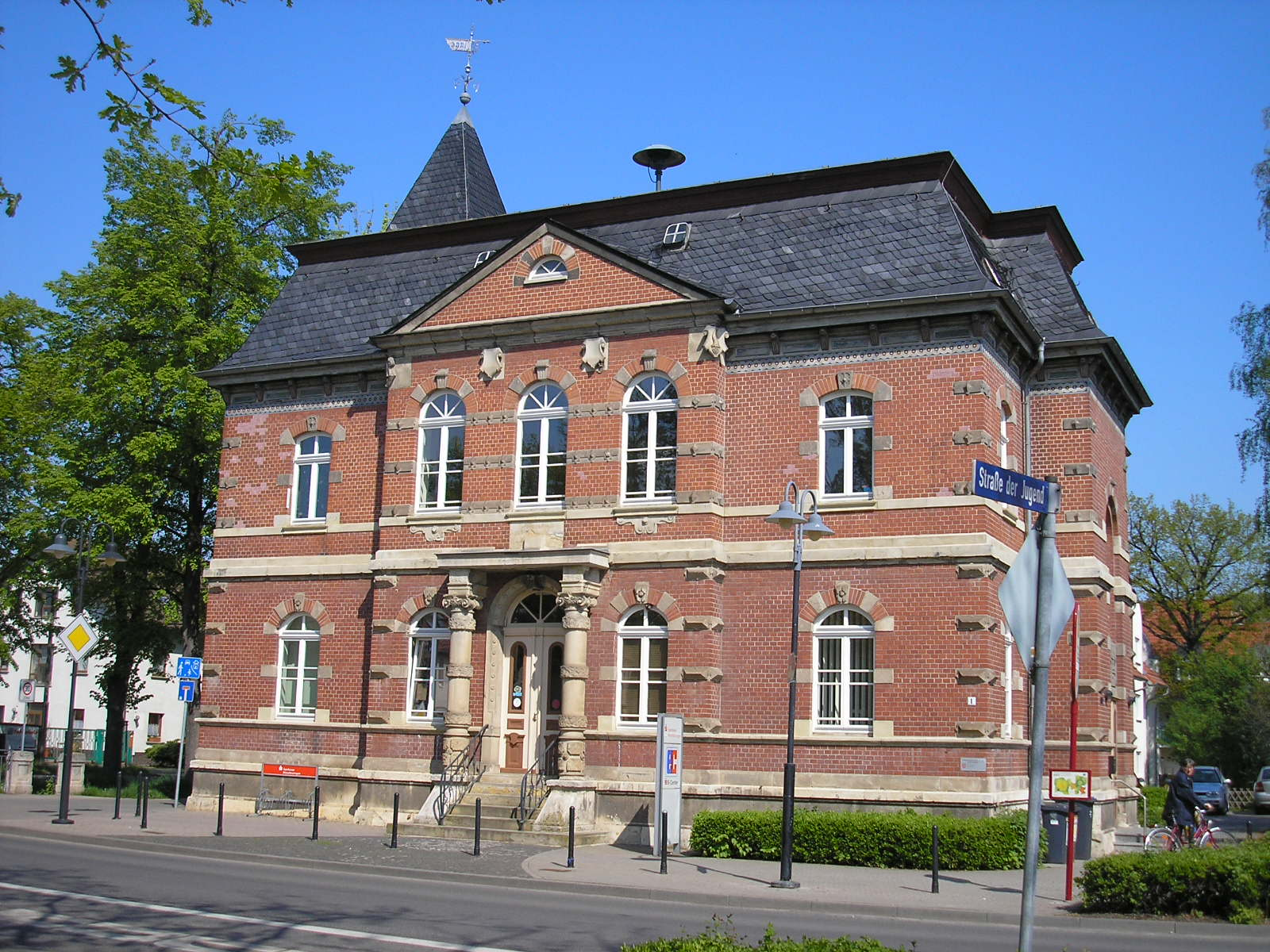 Das Rathaus in Vieselbach (Thüringen)